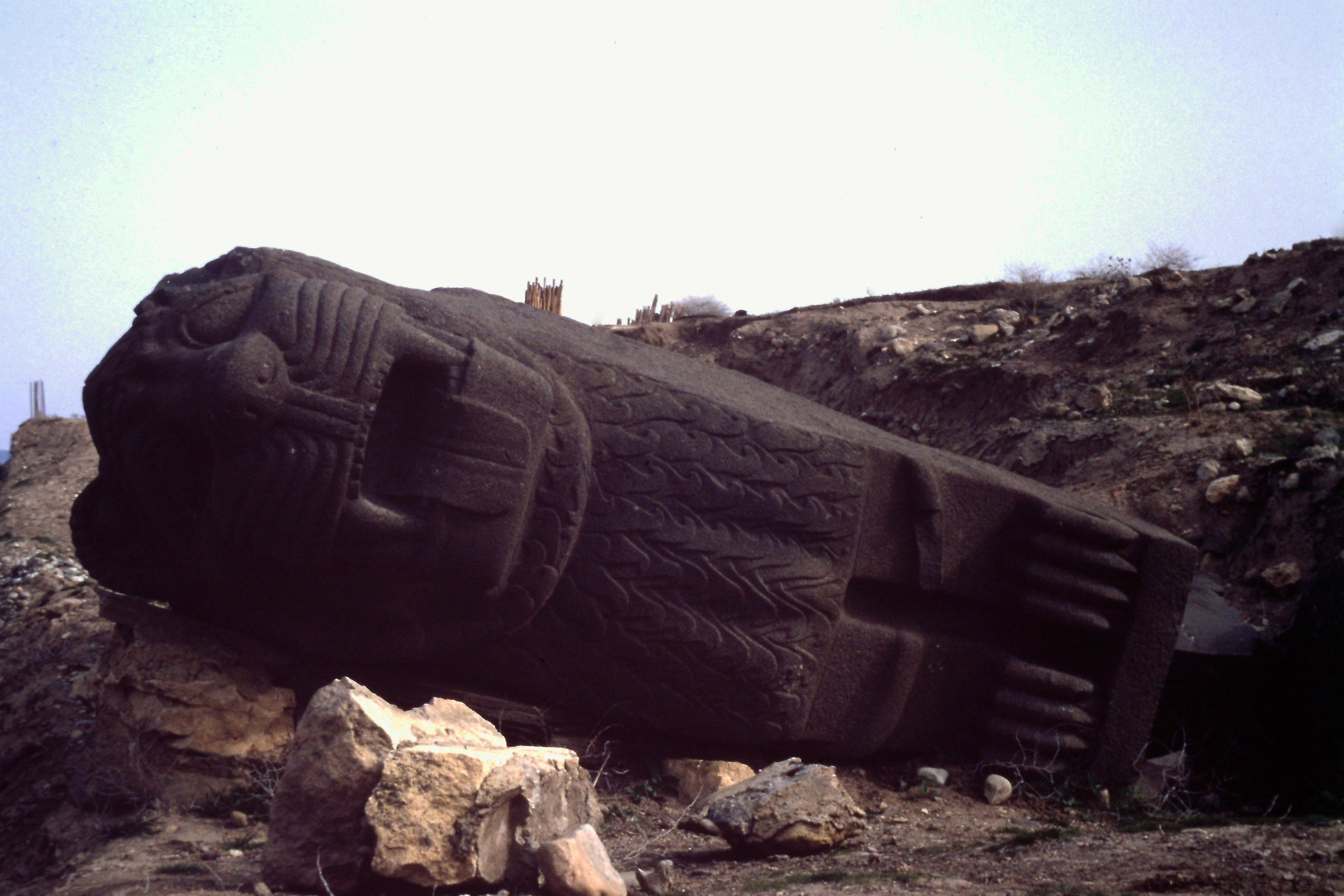 Tempio ittita, Ain Dara, 1993